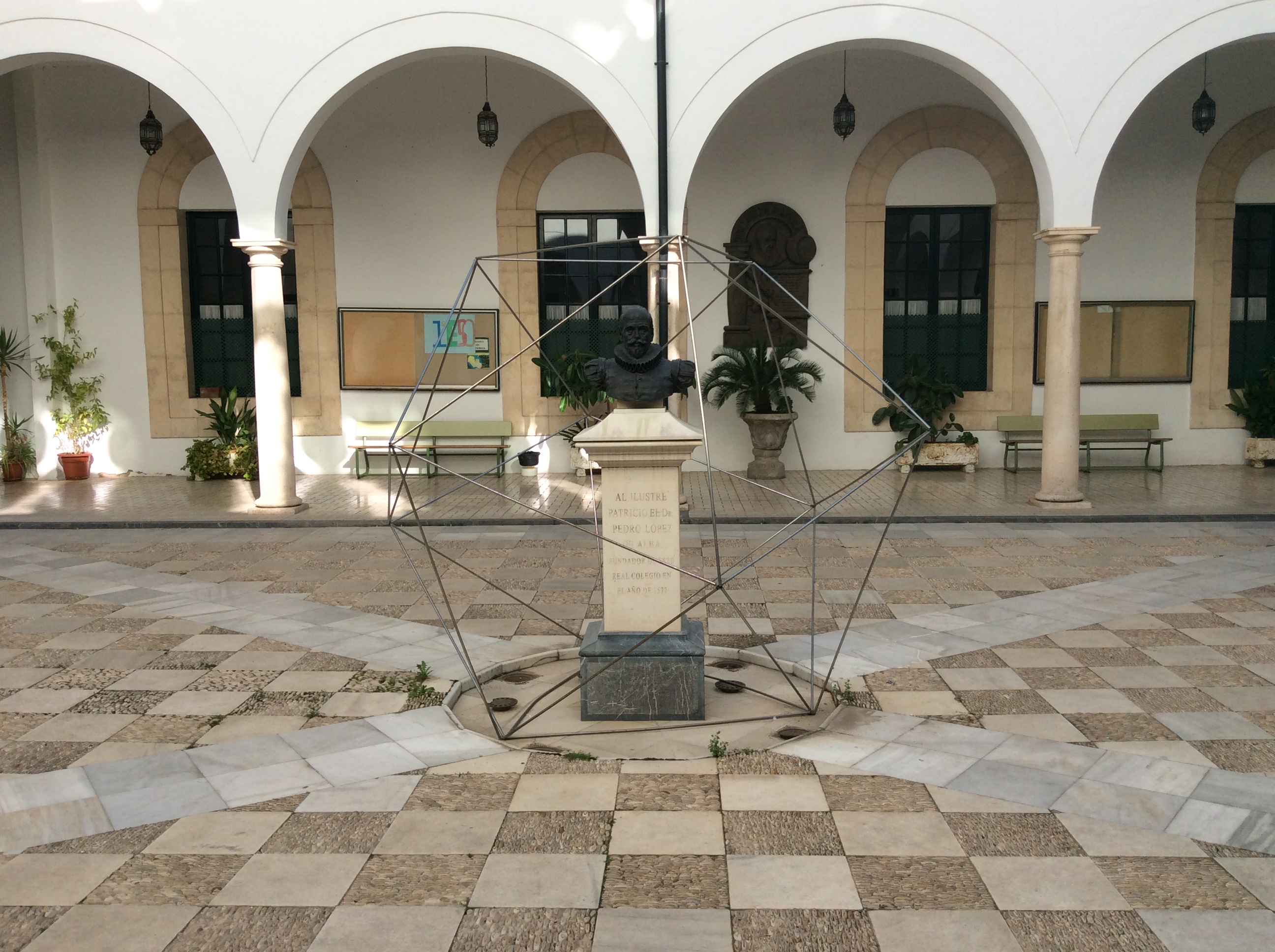 Busto de Pedro López de Alba. El busto es copia del original, realizado por Mateo Inurria y situado en el patio de Columnas del edificio Pedro López de Alba, propiedad de la Universidad de Córdoba